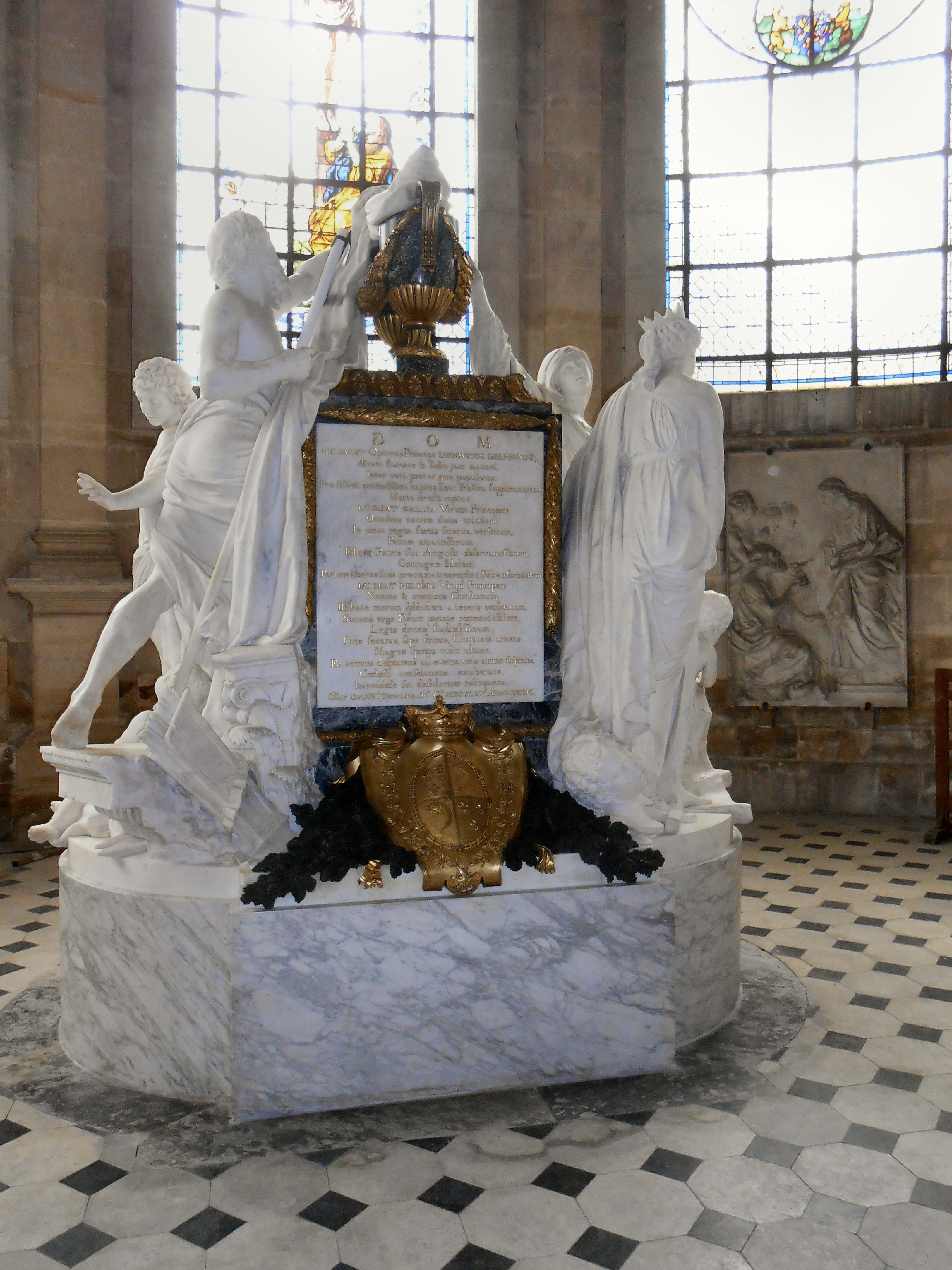 Mausolée de Louis Ferdinand de France - fils de Louis XV - et de Marie-Josèphe de Saxe, son épouse.